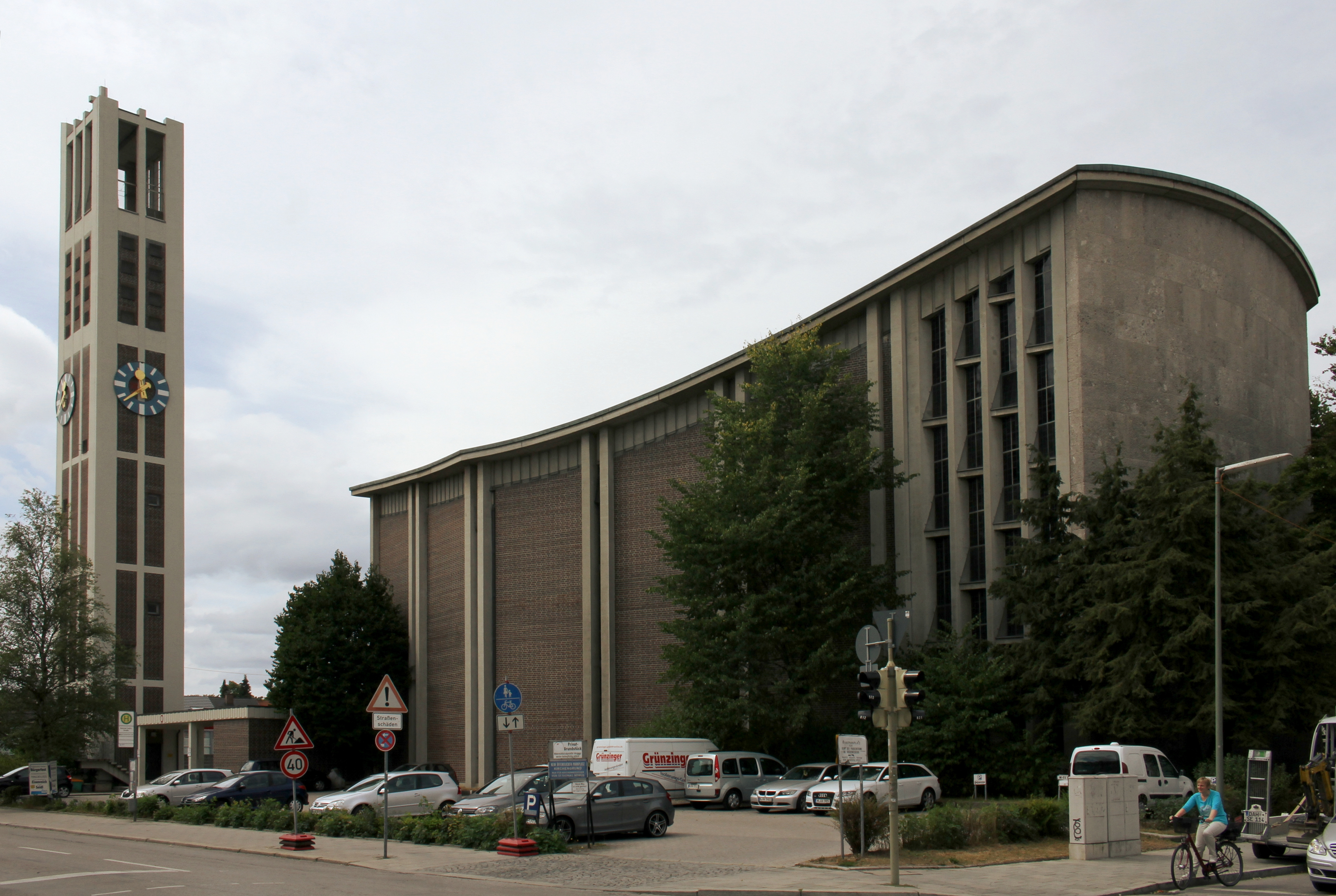 St. Thomas Morus church in München, Sendling-Westpark.